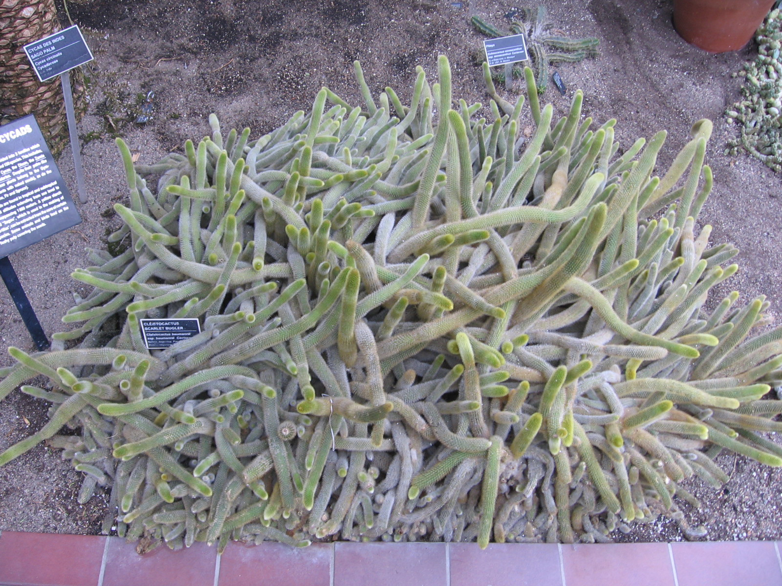 Cleistocactus baumannii, Jardin Botanique de Montréal